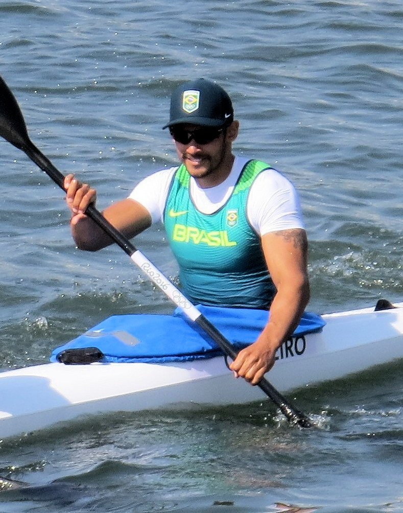 Sx50